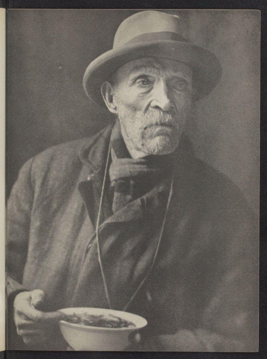 Portretstudie door Toni Arens-Tepe. "III. Bedelaar 82jr" Uit: Het is bij den avond. Een bundel novellen van J.K. van Eerbeek, L.M. Hagen, H.J. Heijnes, Diet Kramer, P. Keuning, Hendrika Kuyper-Van Oordt, C. Rijnsdorp, Anne de Vries, J.M. Westerbrink-Wirtz en Wilma. Met portretstudies van T. Arens-Tepe en met een inleidend artikel van A.M. de Vries Robbé-Bergmans. Uitgegeven door Bosch en Keuning te Baarn [1932].